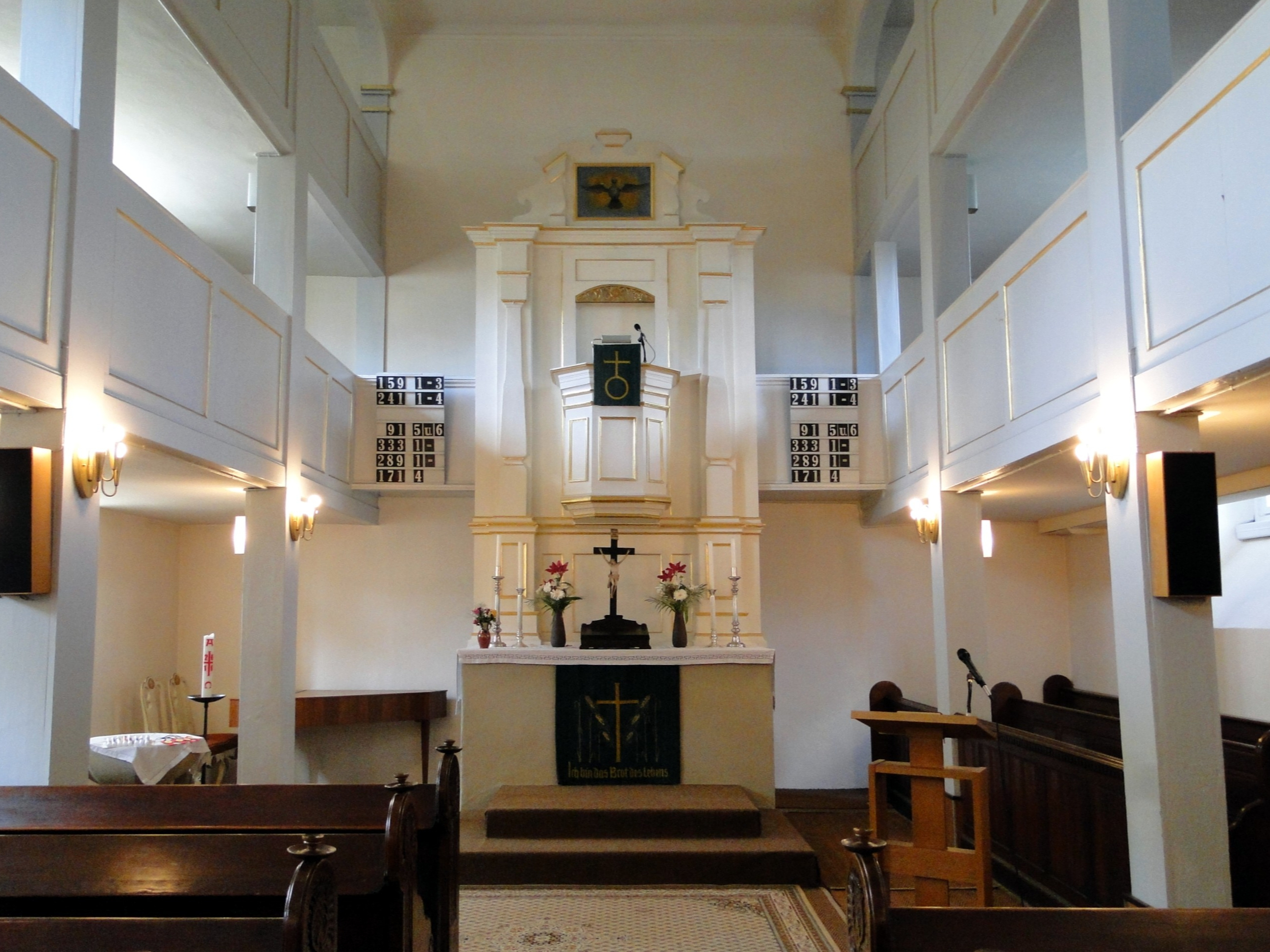 Altar Alte Kirche Klotzsche